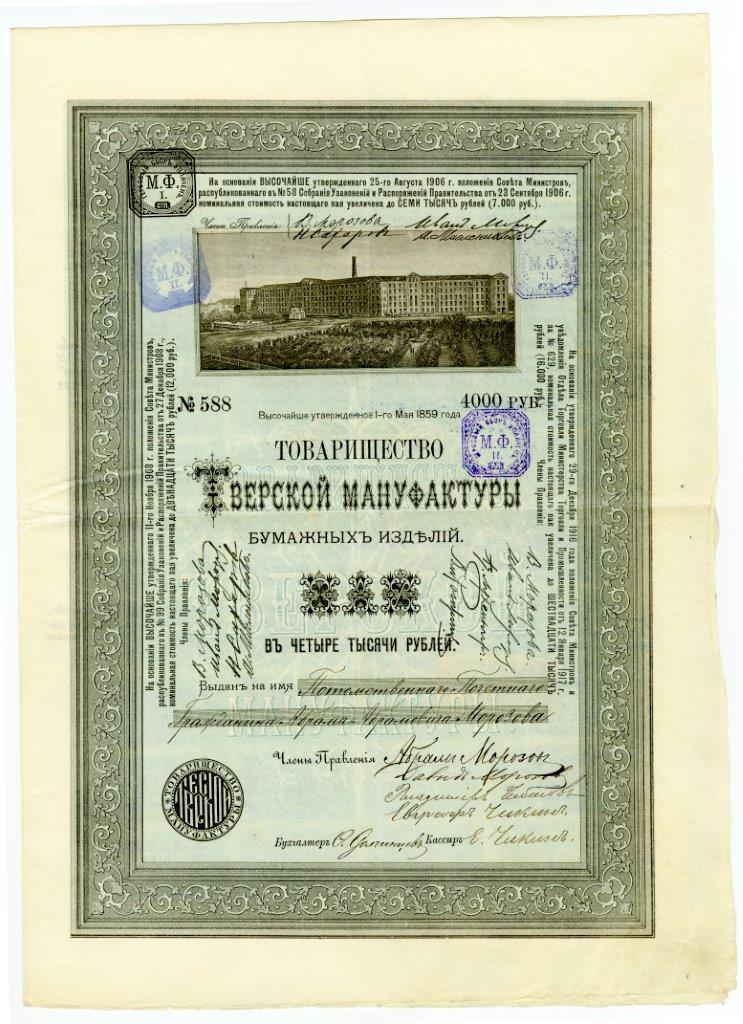 Пай в 4 тыс. руб. на имя А. А. Морозова Товарищества Тверской мануфактуры бумажных изделий. 1917 г.